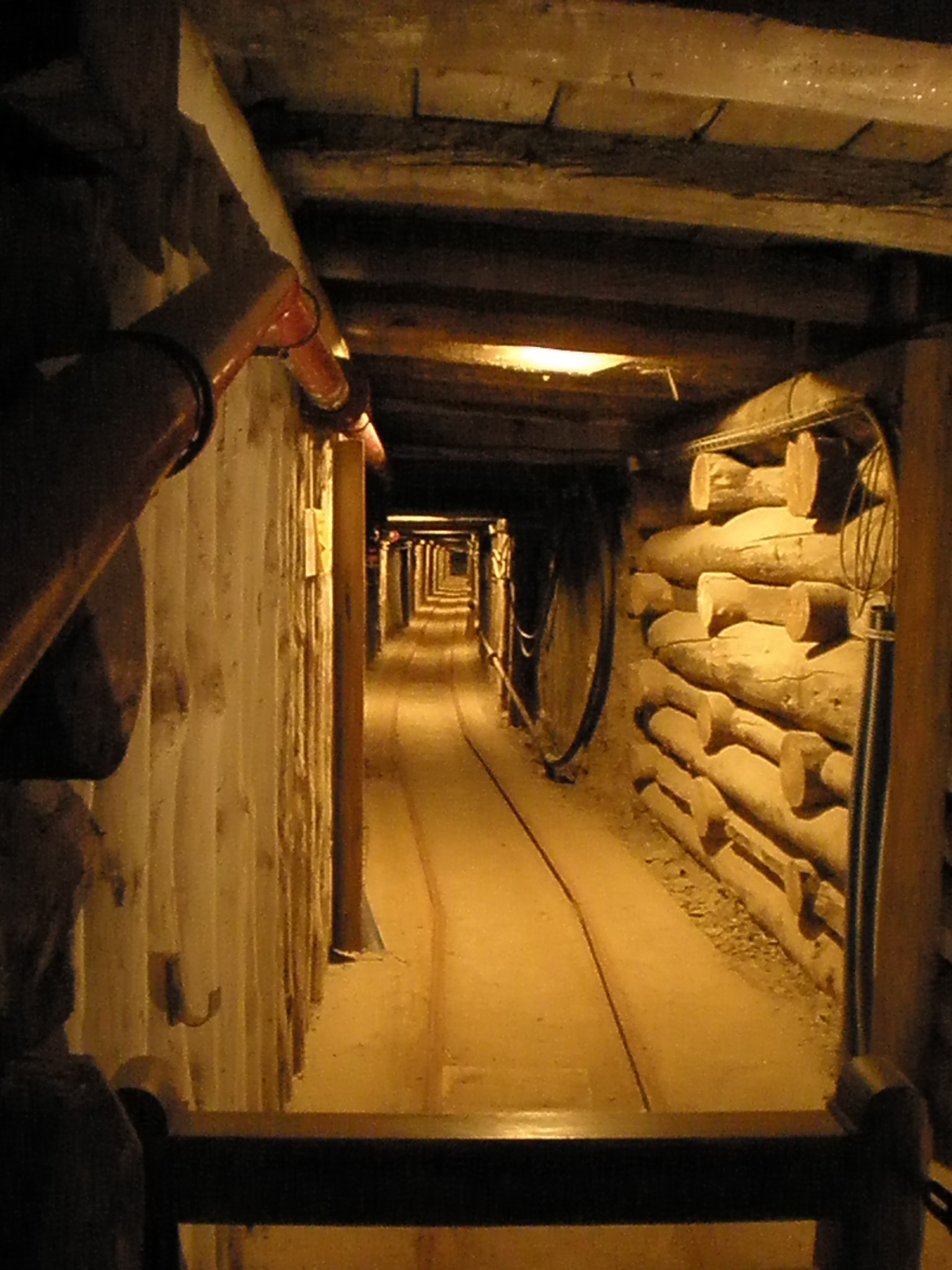 Kopalnia soli Wieliczka